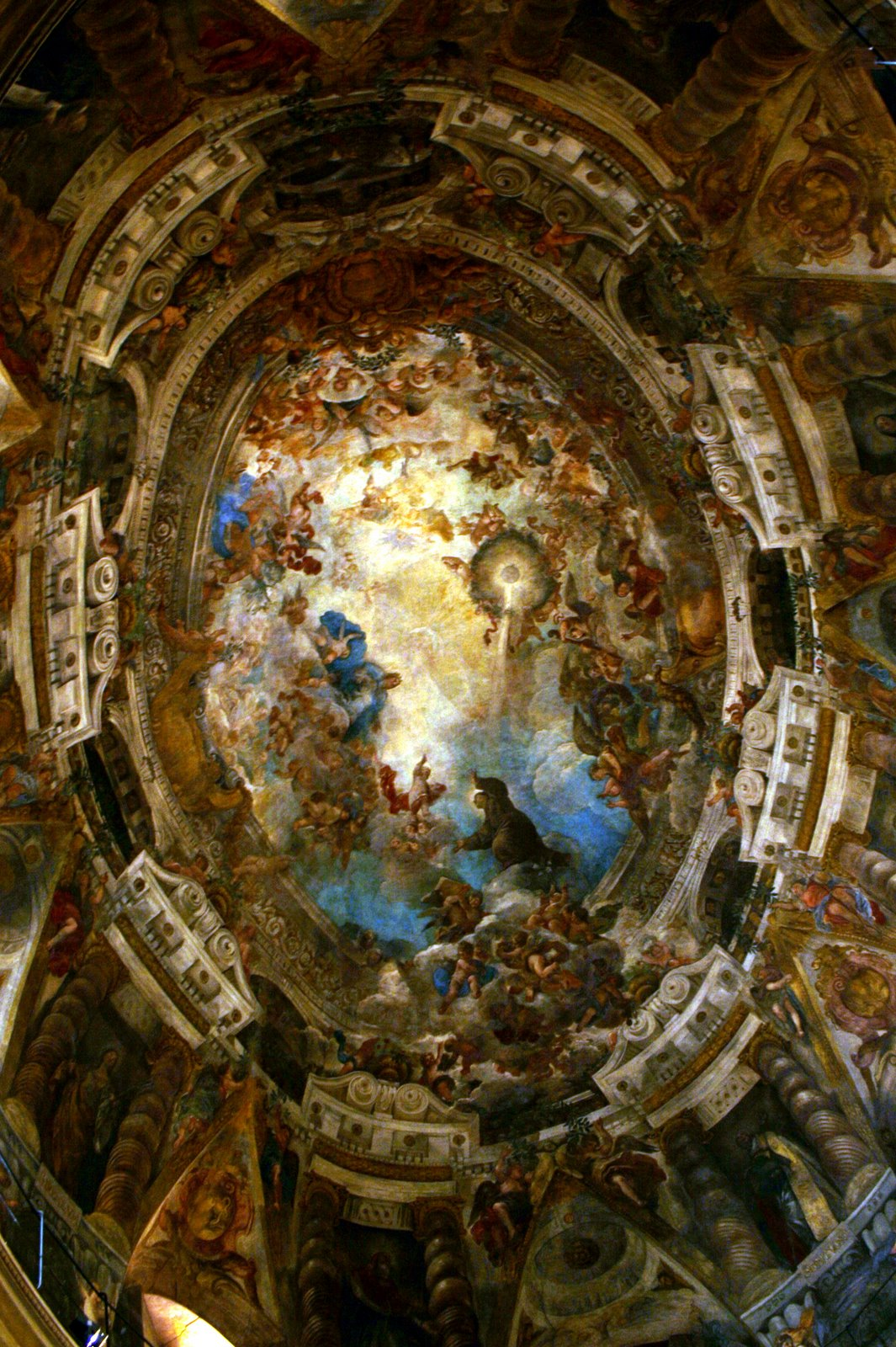 Juan Carreño de Miranda y Francisco Rizi, San Antonio de los Alemanes, Madrid.